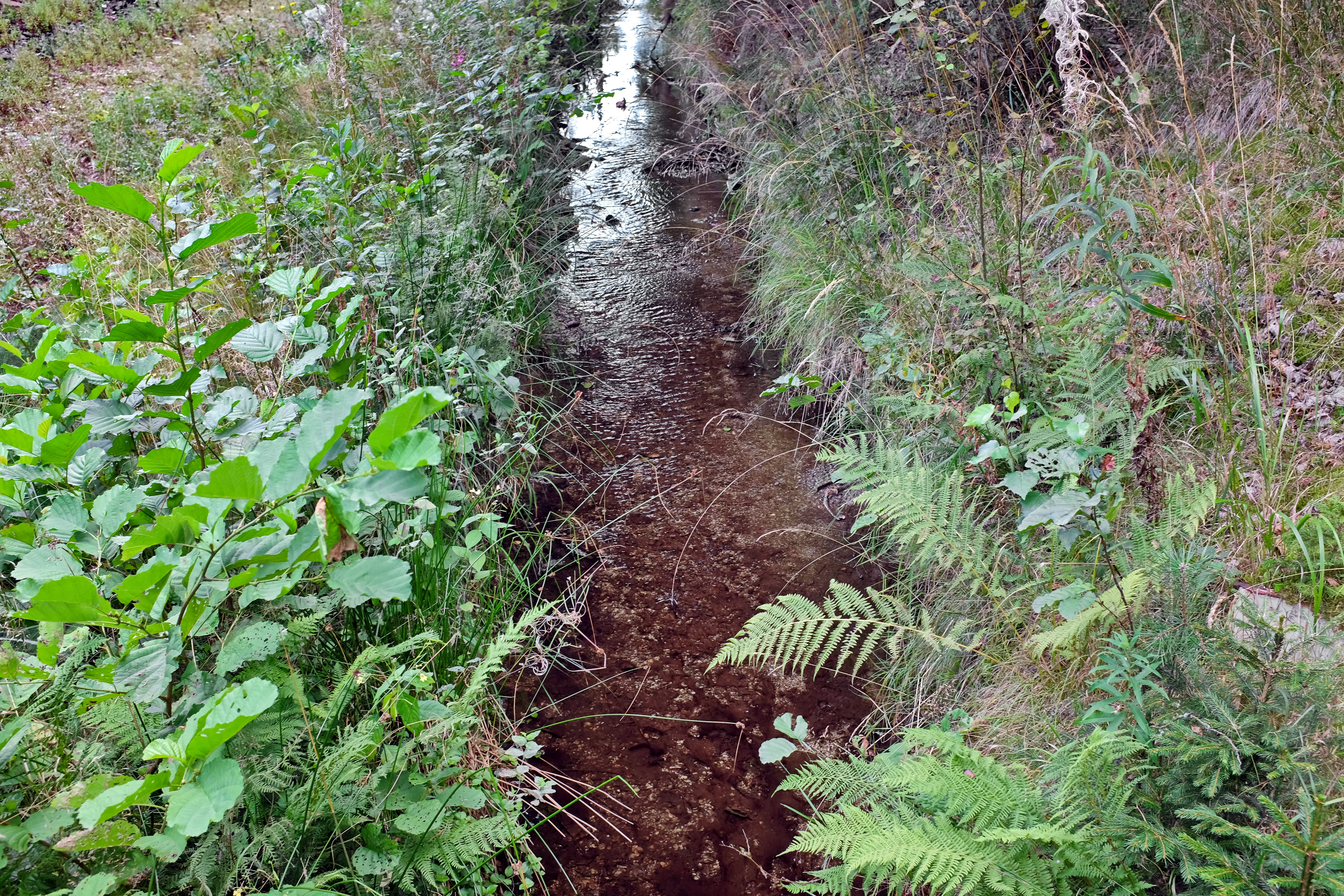 Mezní potok, přítok Svatavy v Krušných horách, okres Sokolov